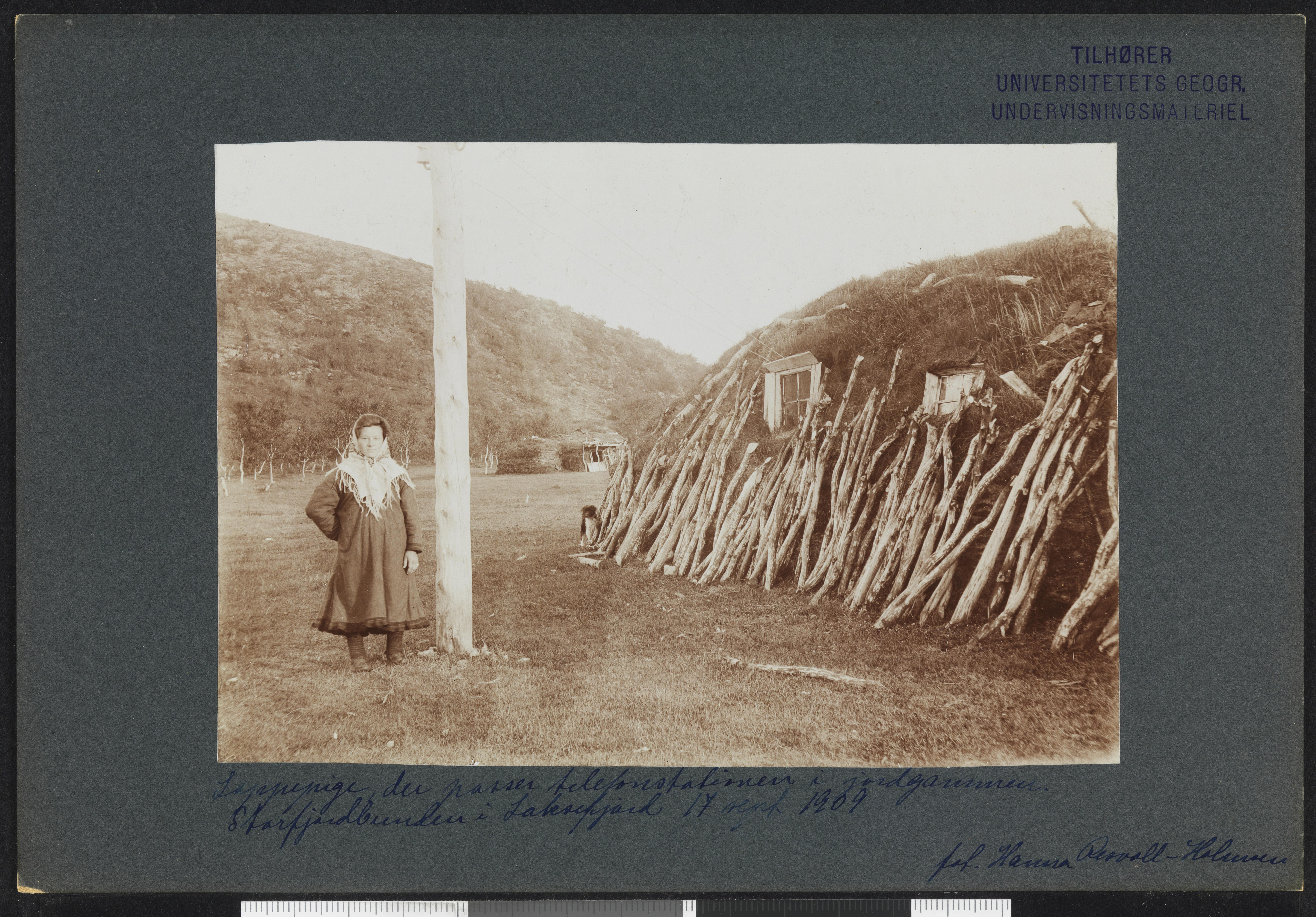 Bildet er hentet fra Nasjonalbibliotekets bildesamling Kunes, Lebesby, Finnmark